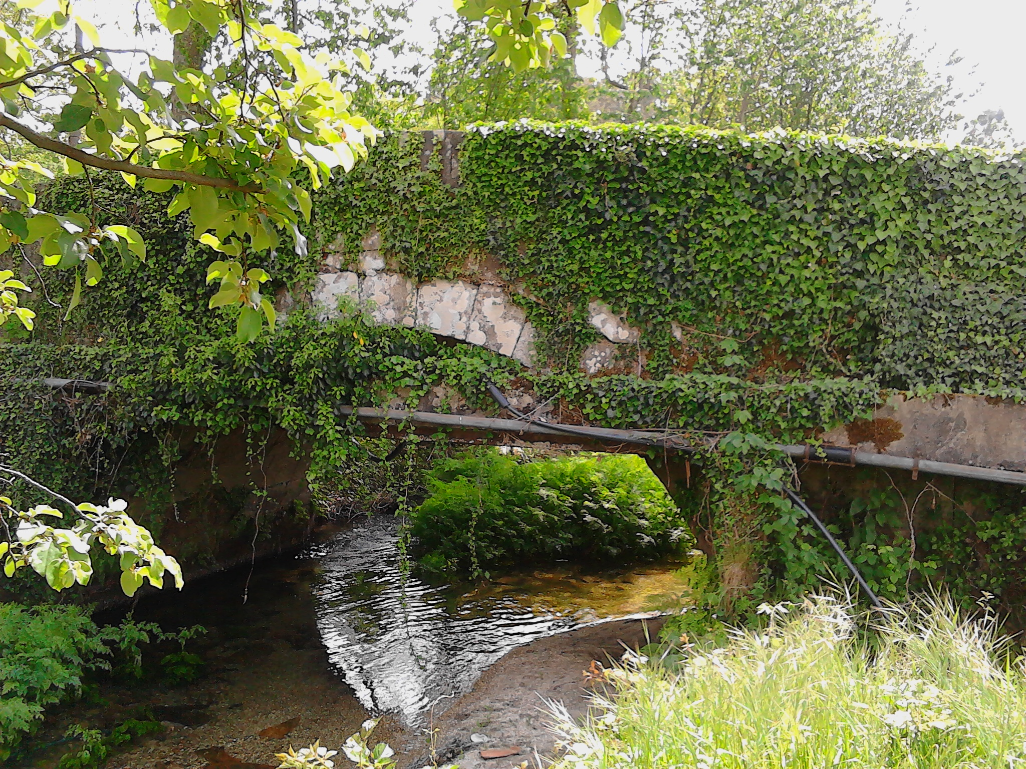 Ponte Romana de Painzela